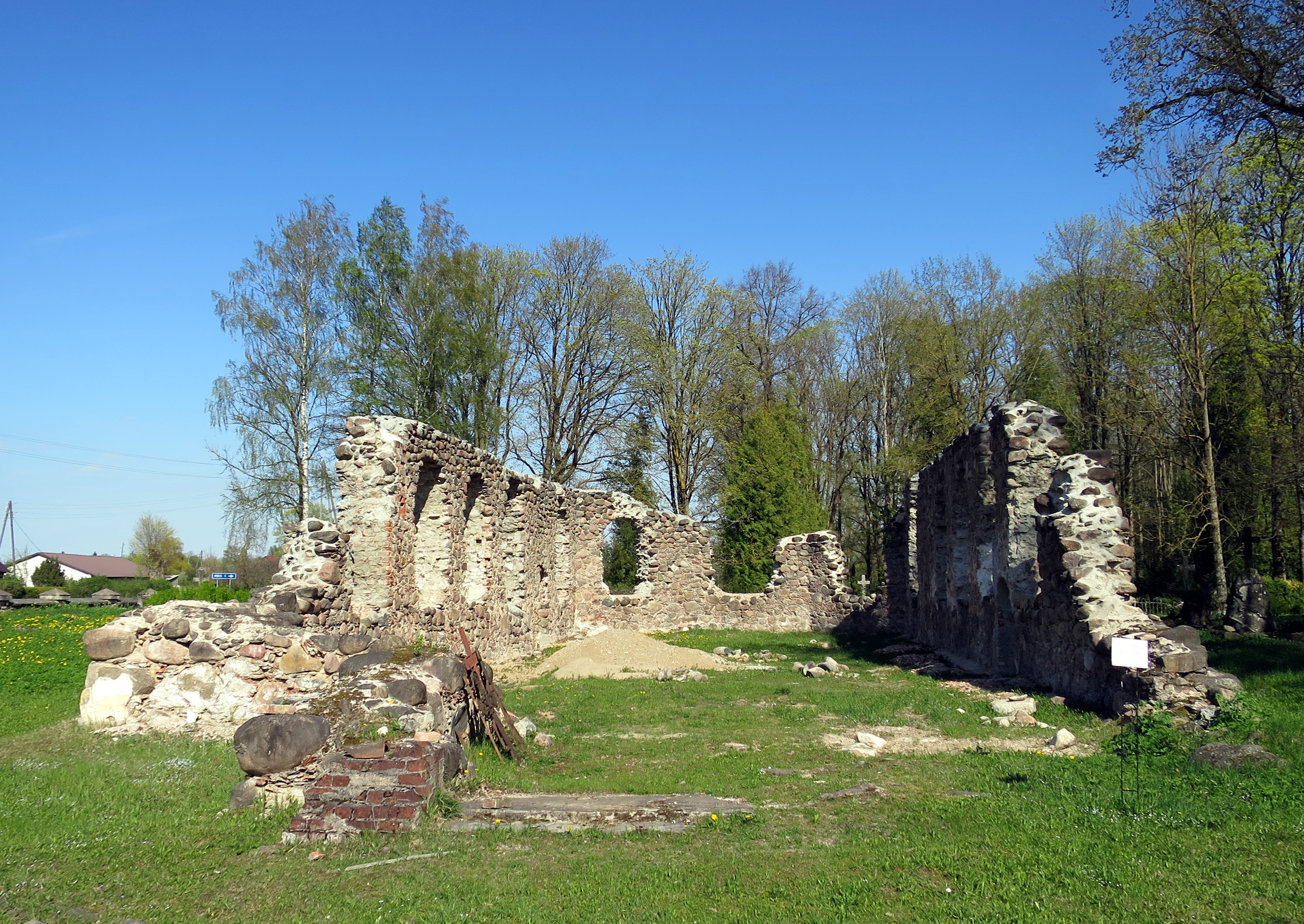 Džūkstes baznīcas drupas